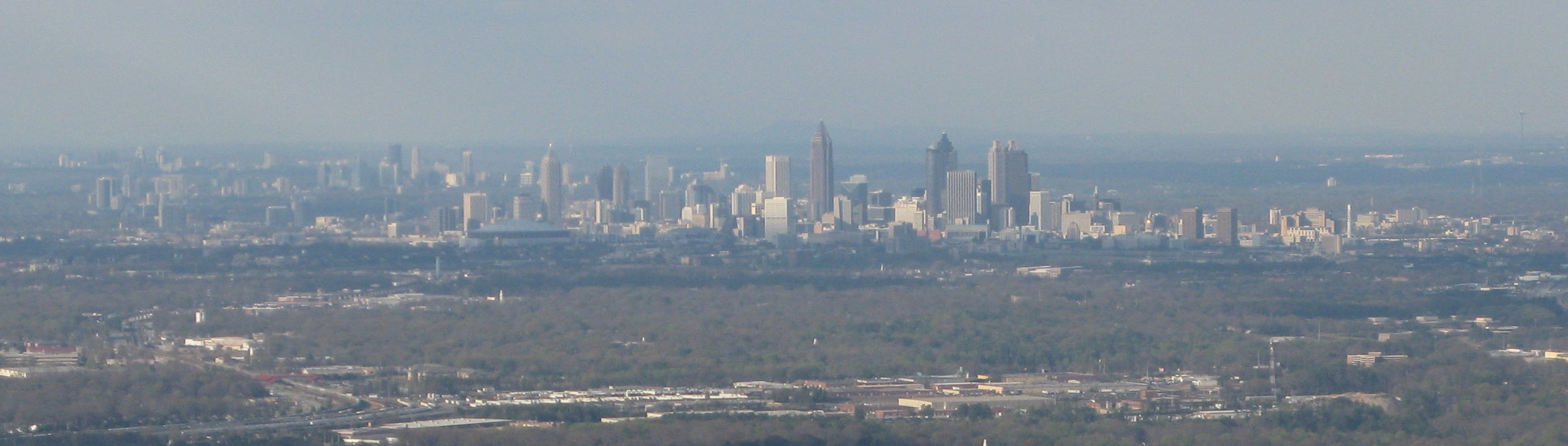 Atlanta cityscape